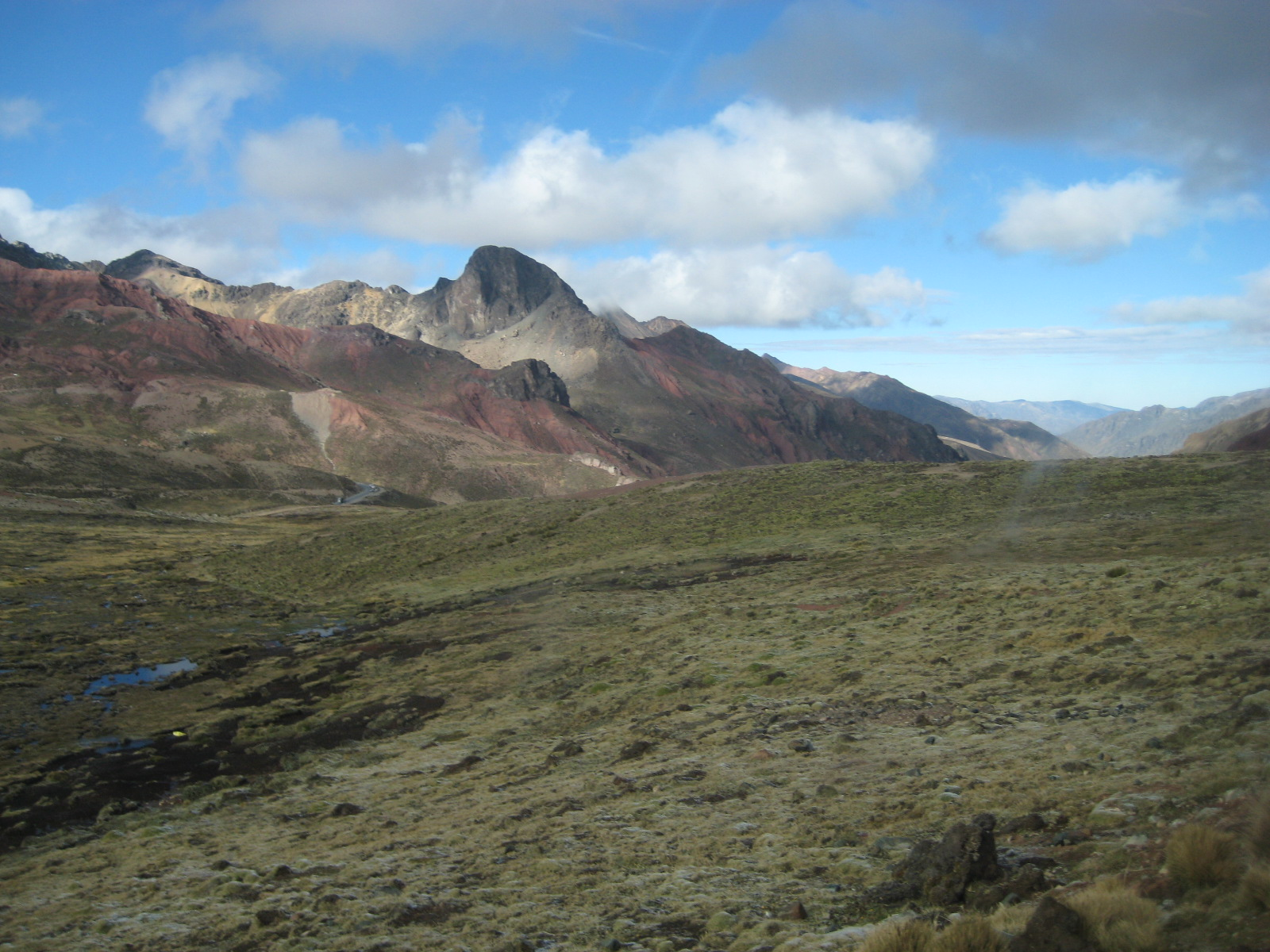 Abra de Anticona - Ticlio, Peru